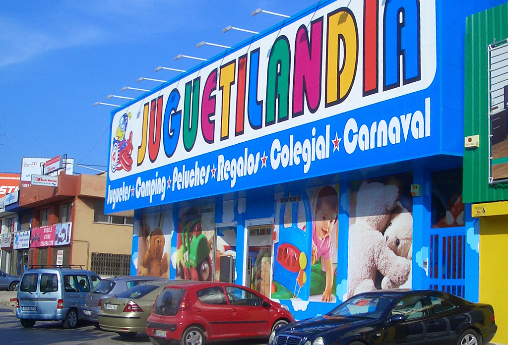 Primera Tienda Juguetilandia